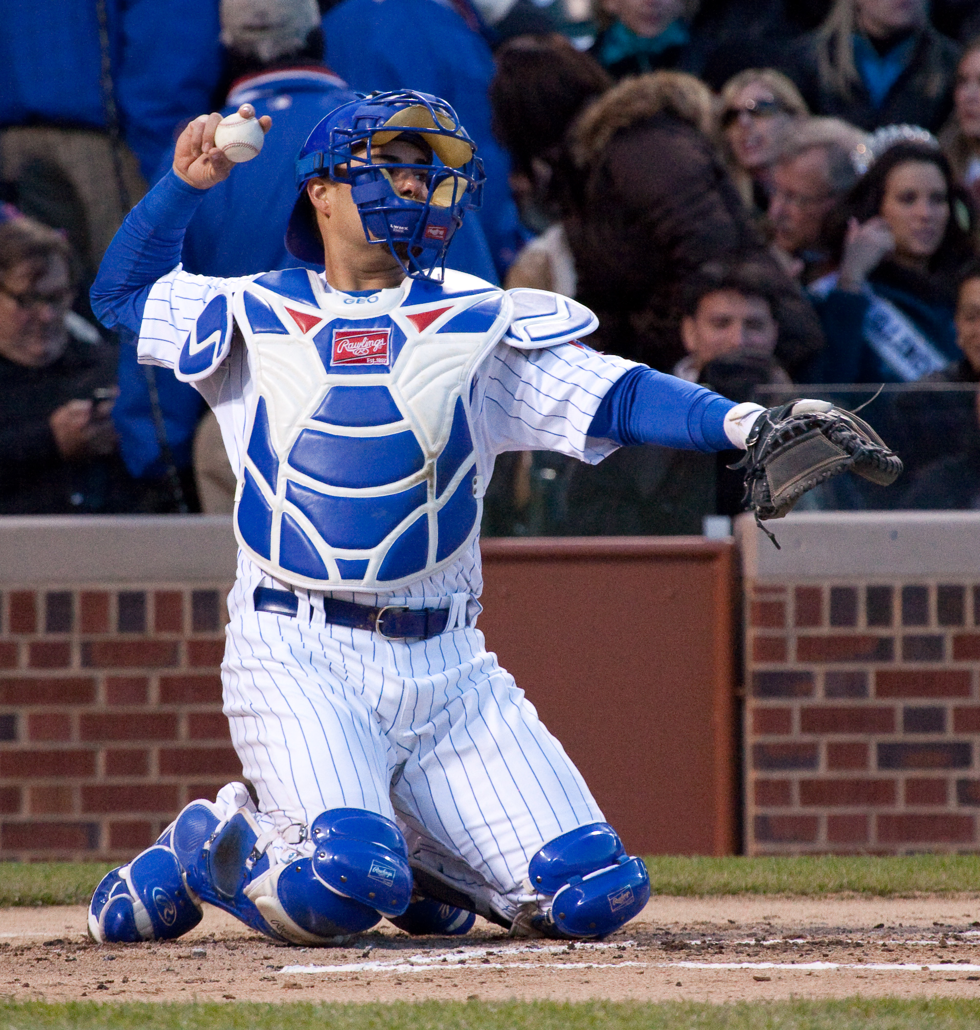 Geovany Soto